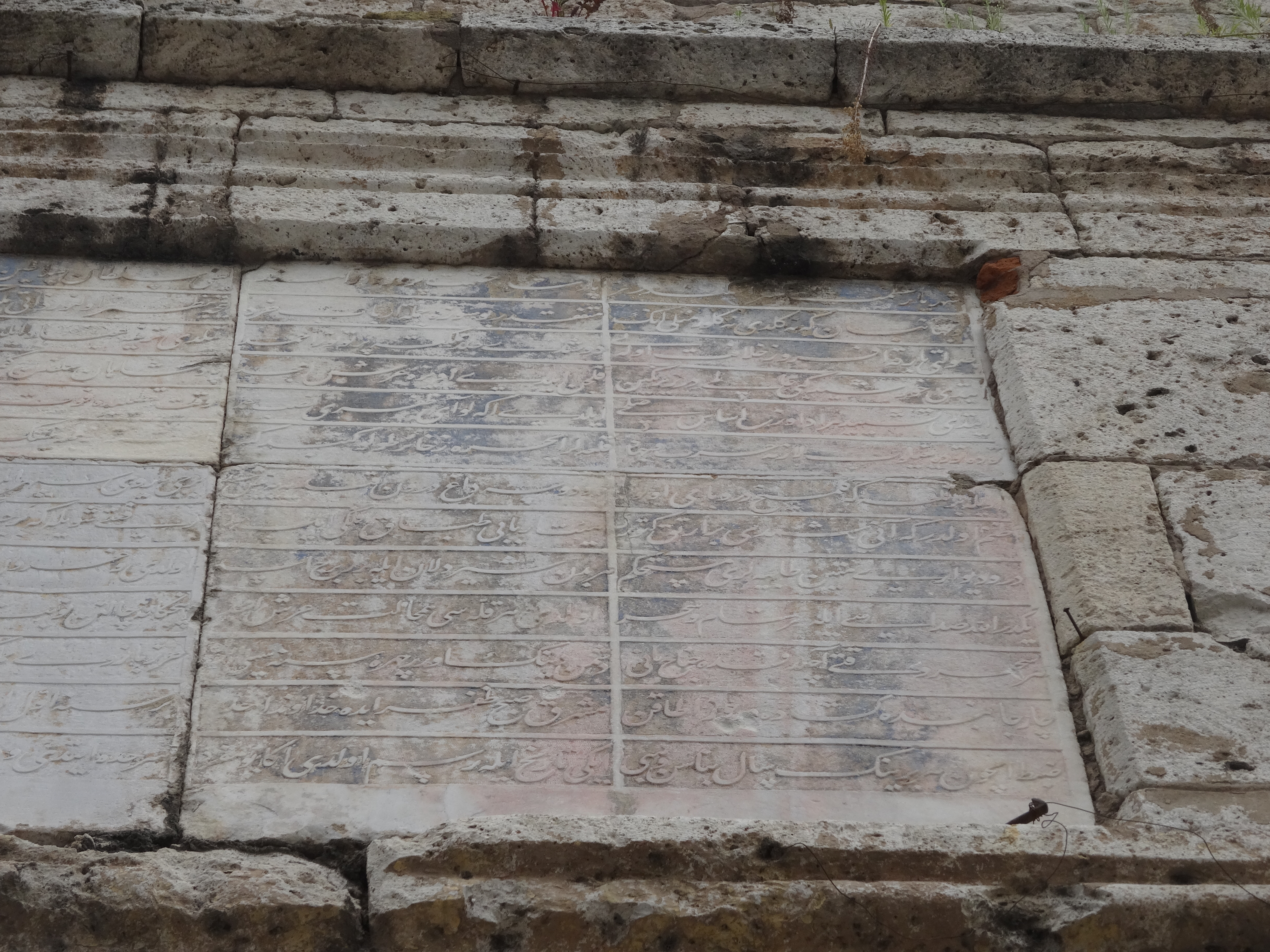 Stambol kapija.